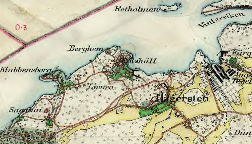 Hägerstens gård och Hägerstenshamnen